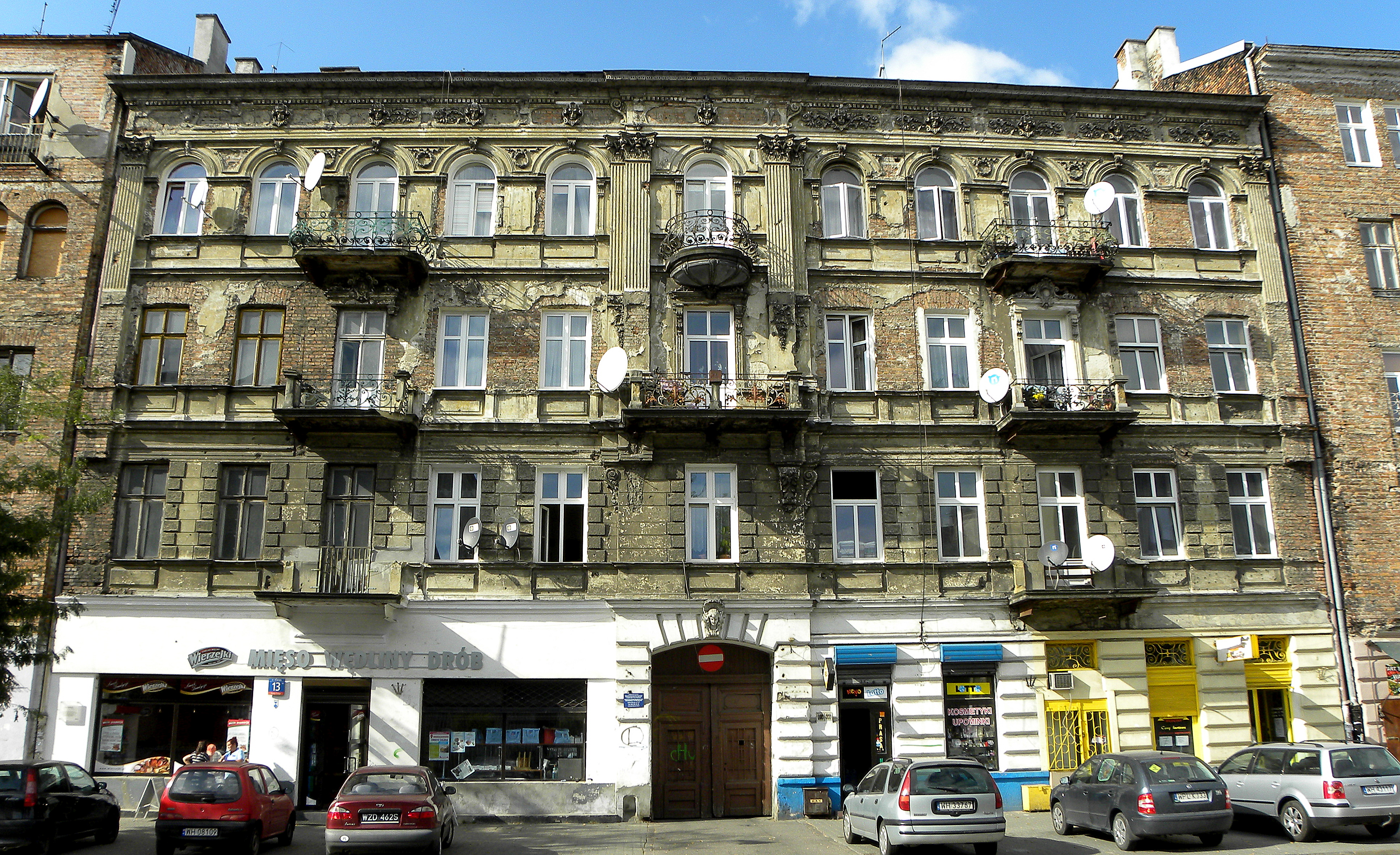 Warszawa ul. Wileńska 13 - kamienica z XIX/XX